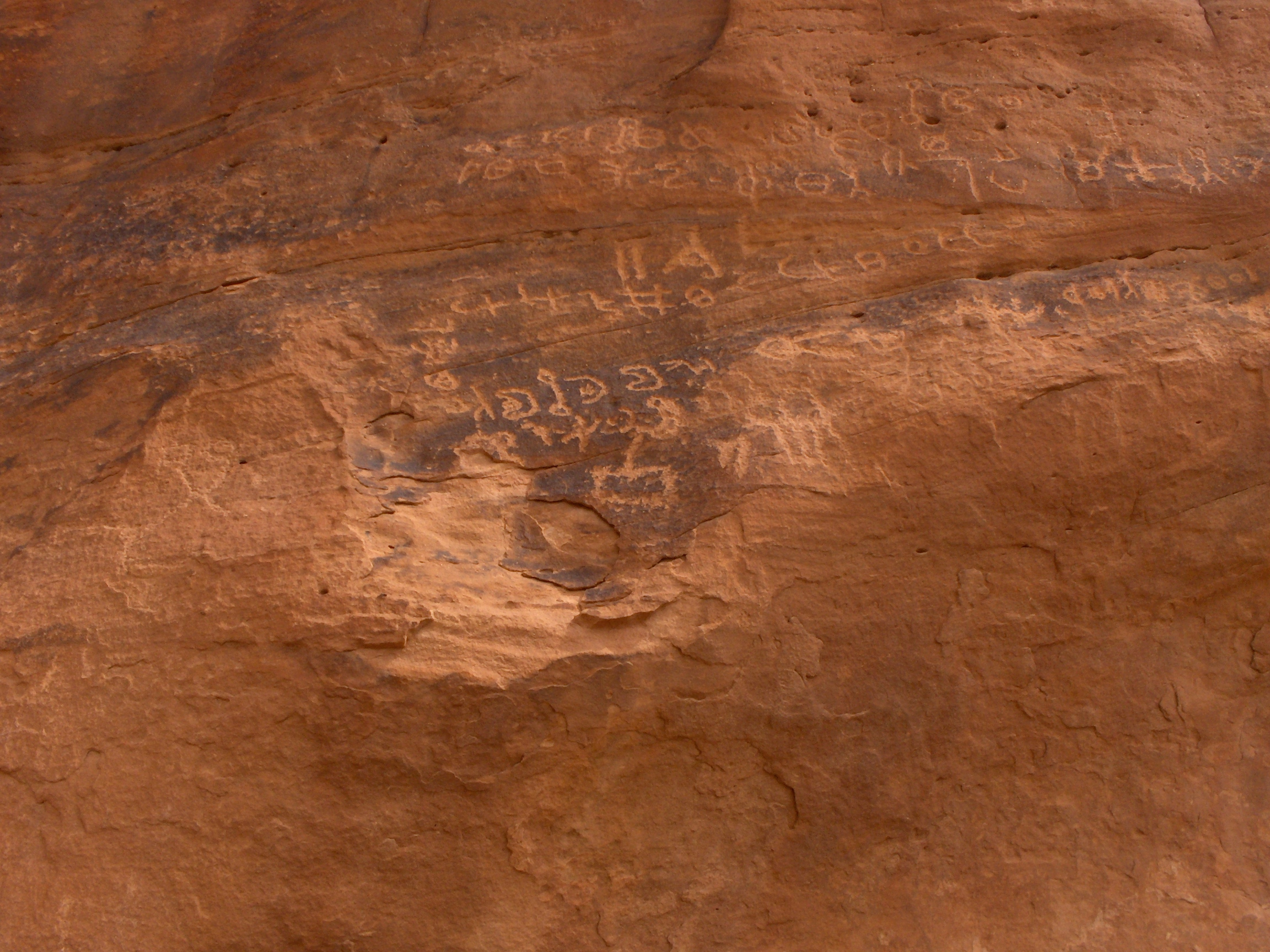 Incisioni rupestri nel Wadi Rum